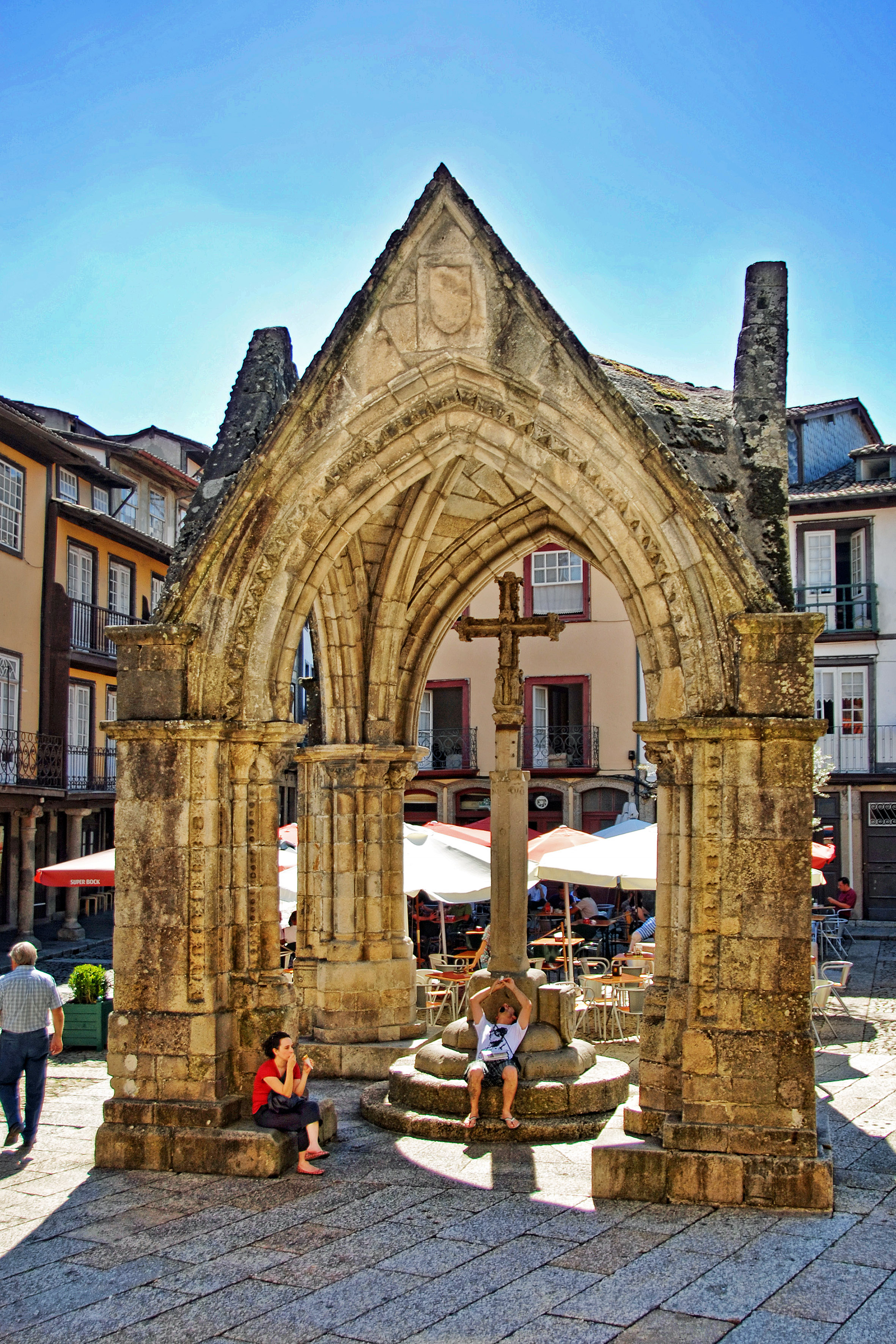 Guimarães - Padrão Comemorativo da Batalha do Salado ou Padrão da Nossa Senhora da Vitória This file was uploaded for Wiki Loves Monuments in Portugal with the unique identifier 70510.